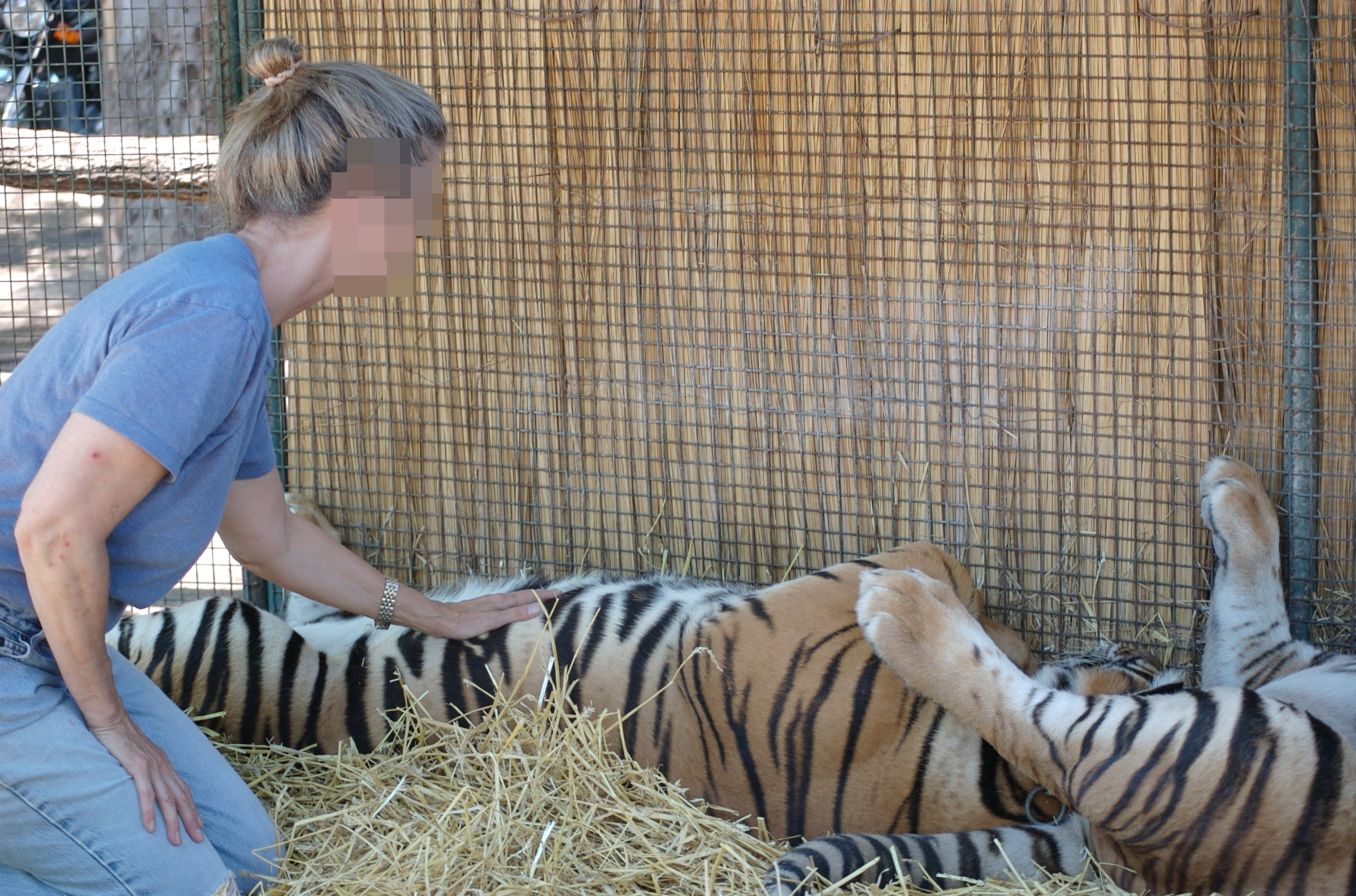 Un visitante dentro de una de las jaulas del Zoo de Luján acariciando a un tigre.